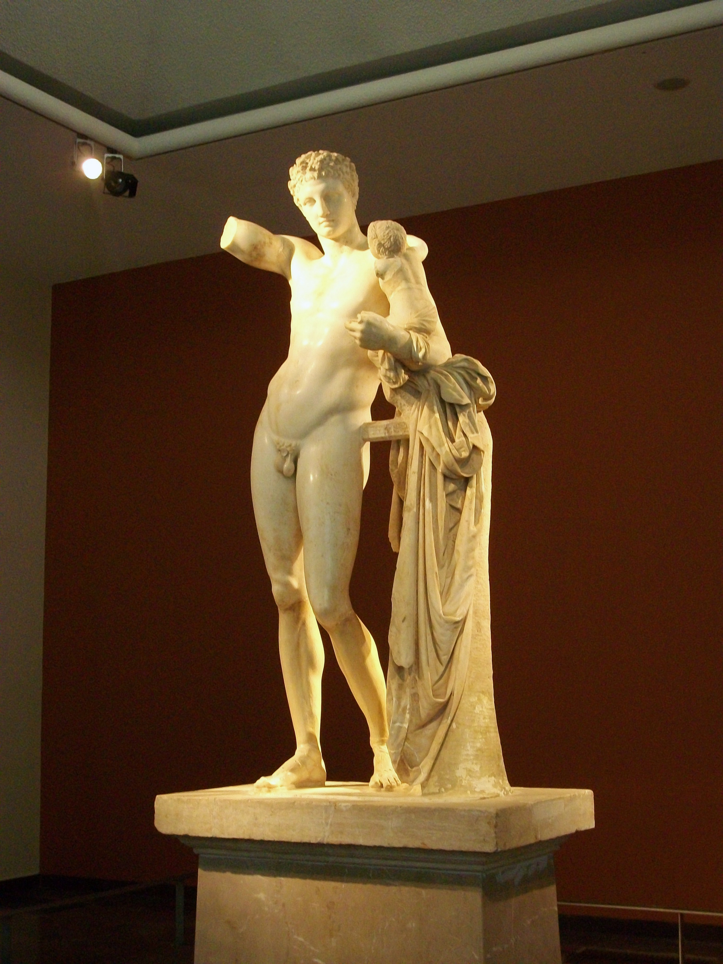 Hermes amb Dionís infant, museu arqueològic d'Olímpia.